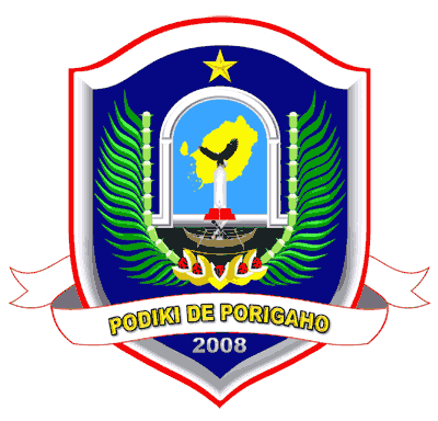 Lambang Kabupaten Pulau Morotai